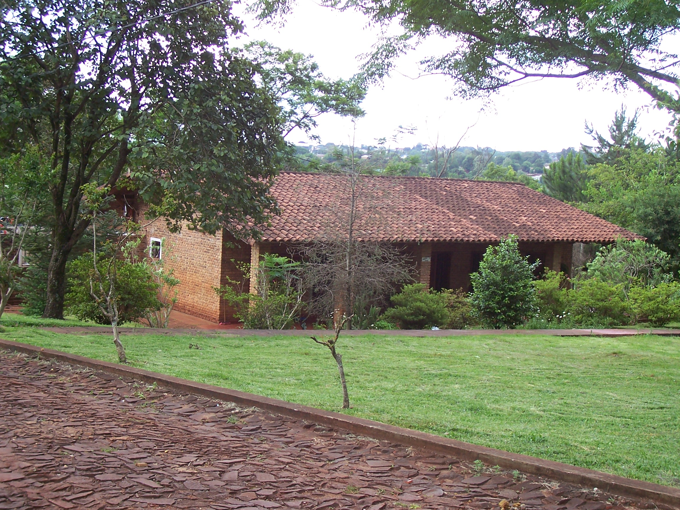 Foto de la calle principal dentro del predio de Aldeas Infantiles SOS de Oberá, Prov. de Misiones.